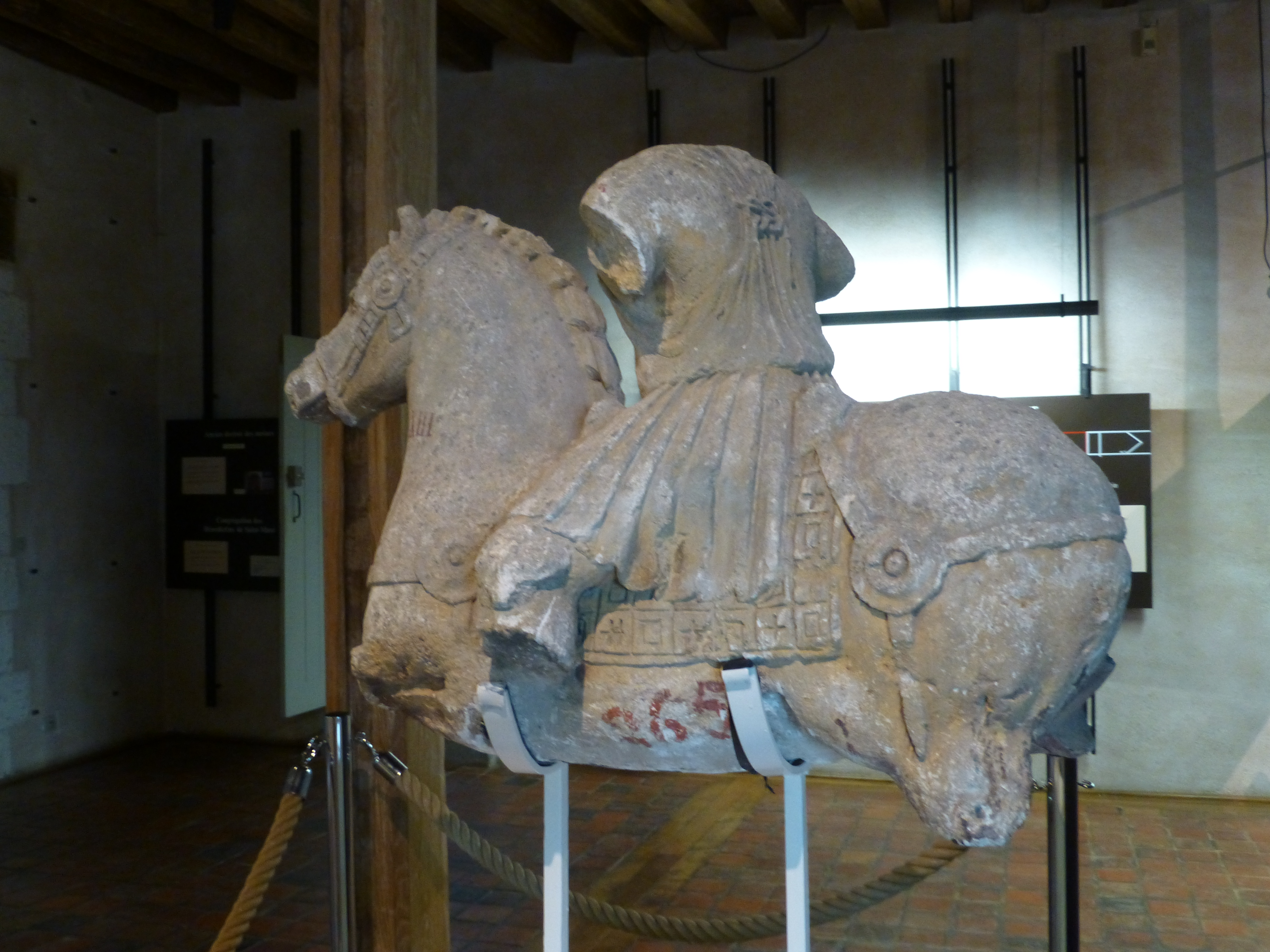 Abbaye Saint-Germain d'Auxerre : statue équestre gallo-romaine, fin du Ier siècle, calcaire (Auxerre)